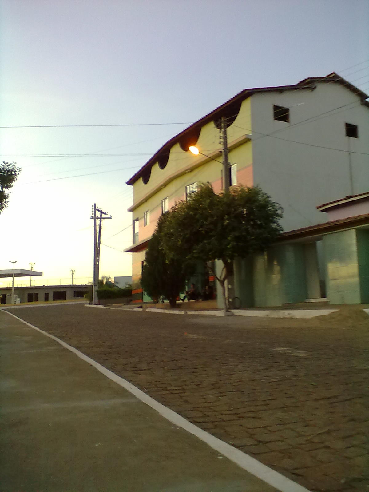 Distrito de Umbaúbba